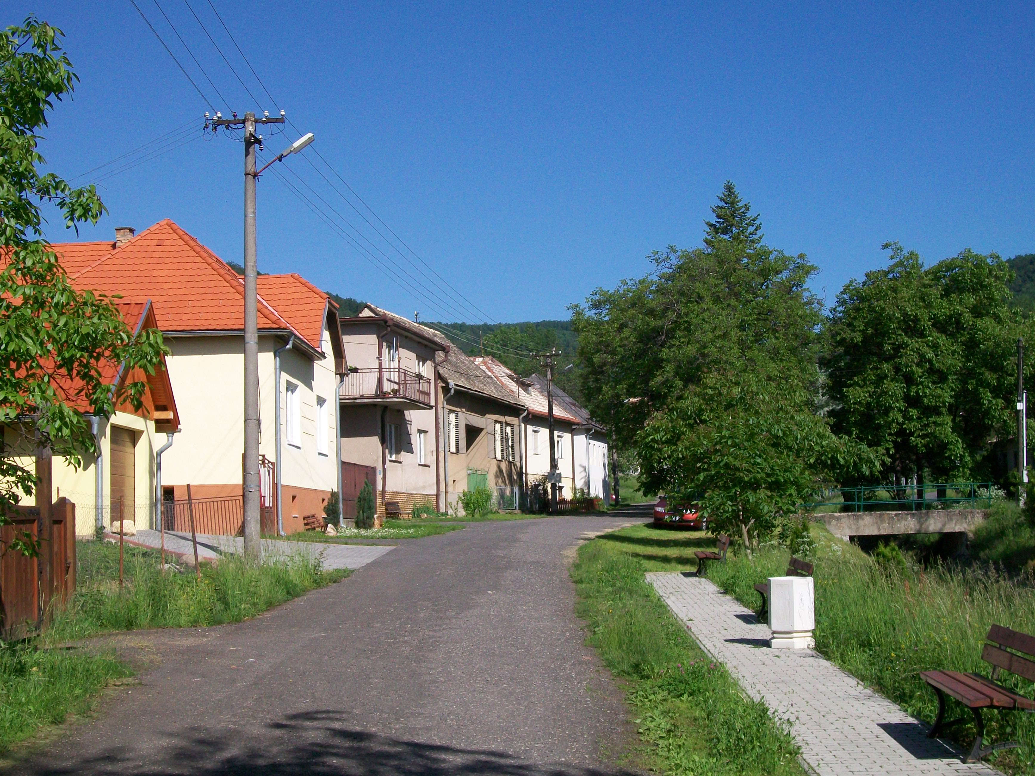 Ulica obce Lupoč